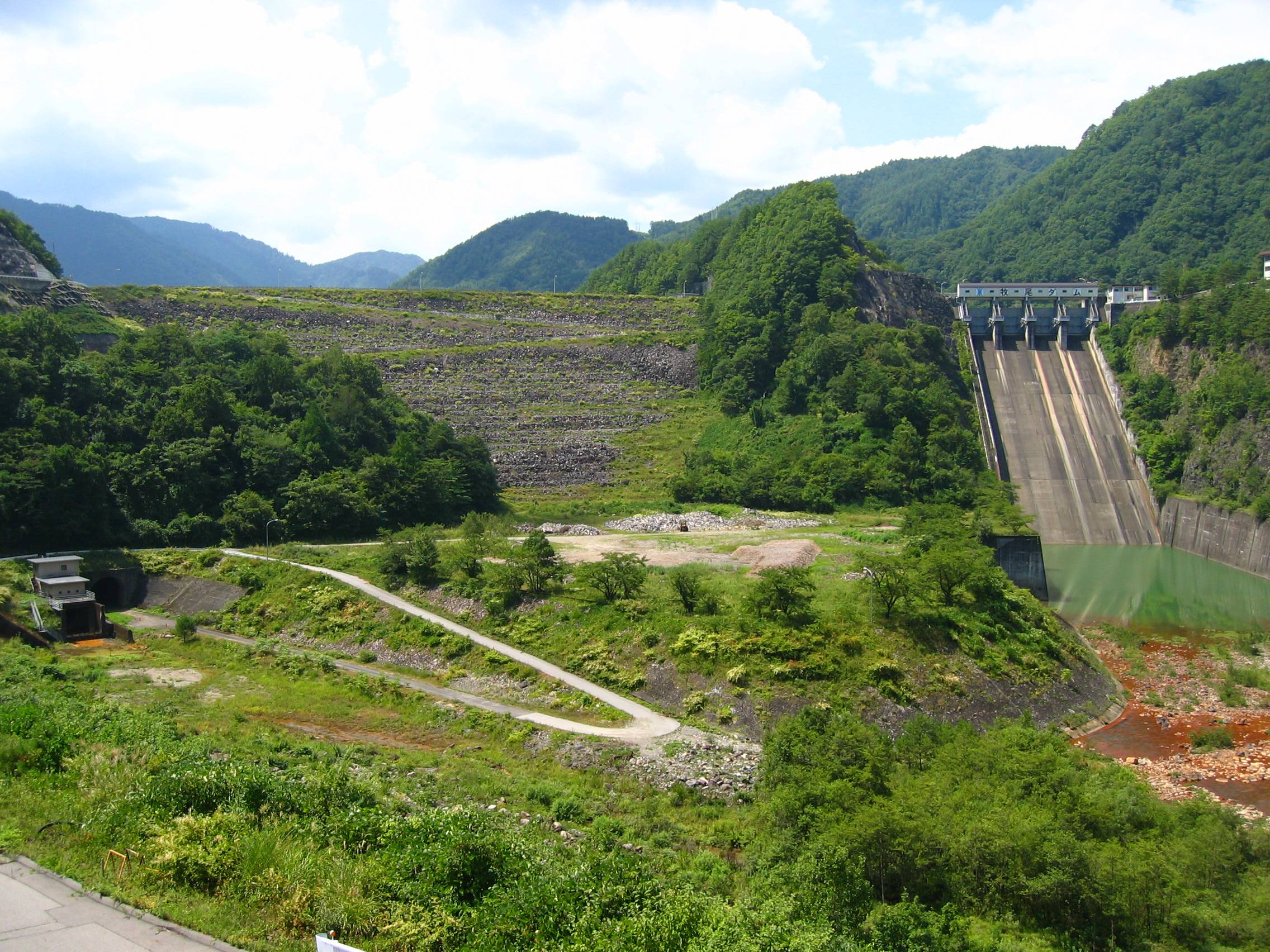 Makio Dam (牧尾ダム) is a dam in Nagano, Japan.